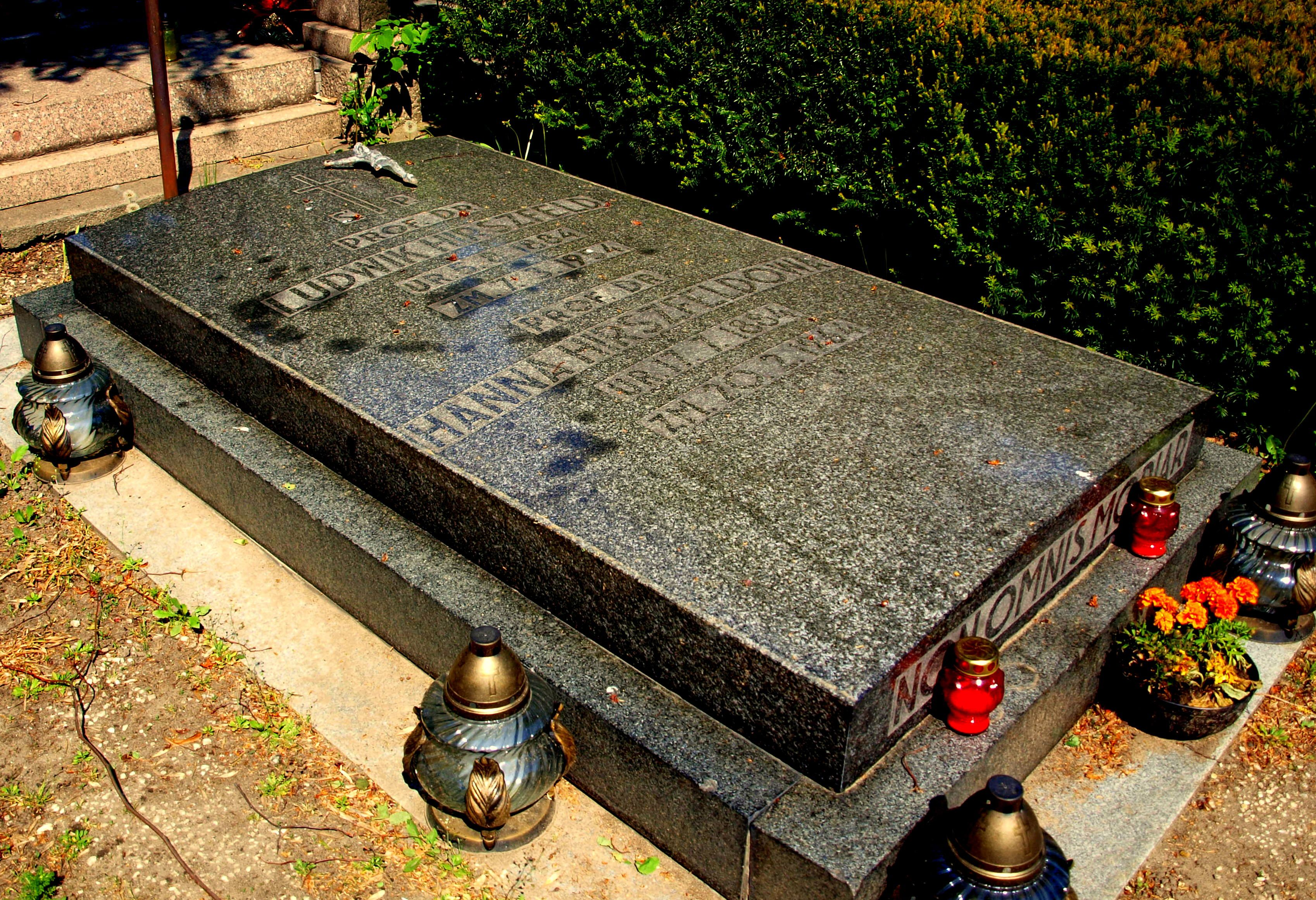 Nagrobek Ludwika Hirszfelda na cmentarzu Św.Wawrzyńca we Wrocławiu. Praca wekonana na konkurs Wrocławski Wikipstryk.